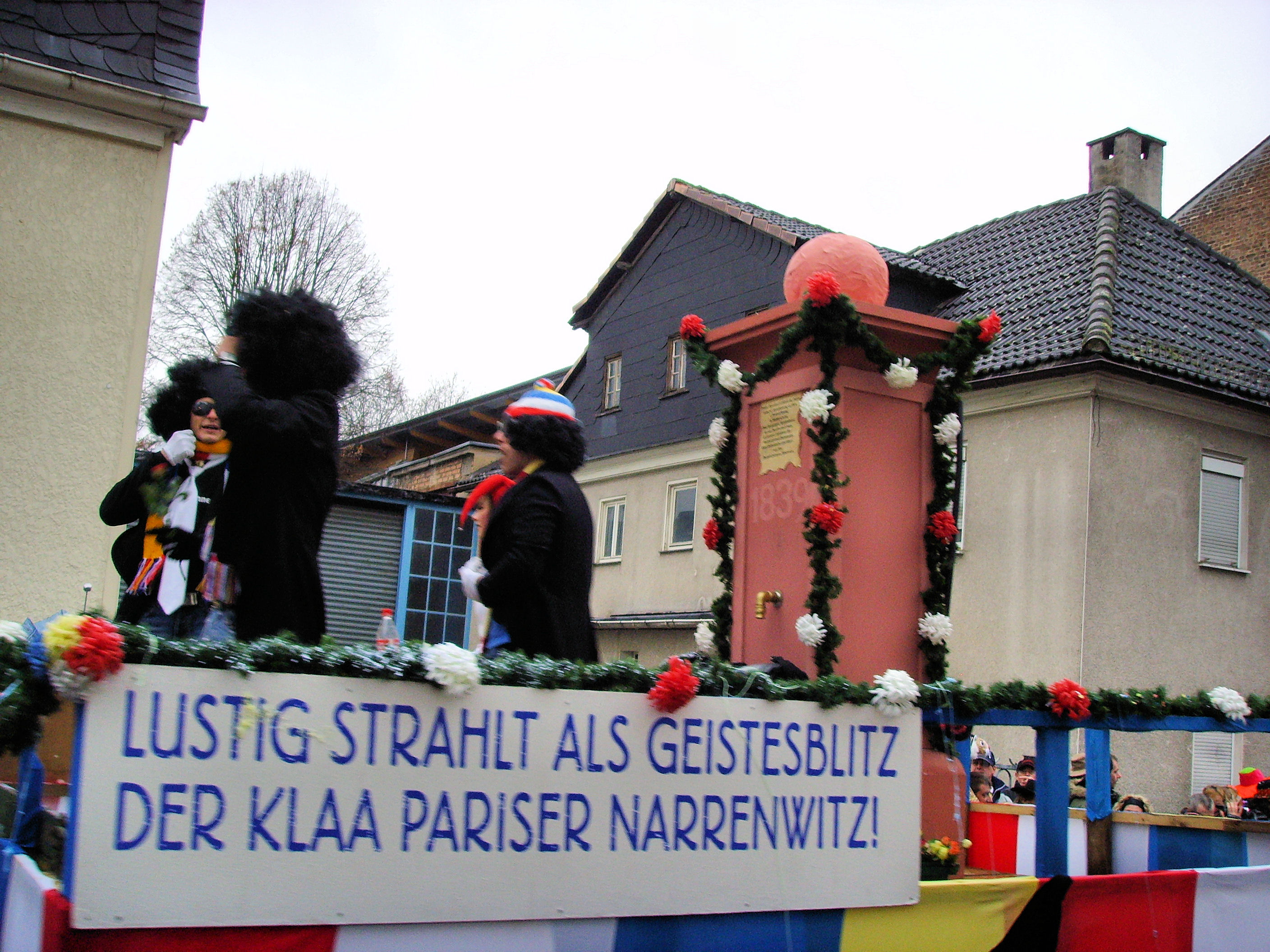 Motto des Fastnachtszugs von Frankfurt-Heddernheim ("Klaaa Paris") 2008, Motivwagen mit dem Symbol der Fastnacht, der ersten öffentlichen Gemeindepumpe